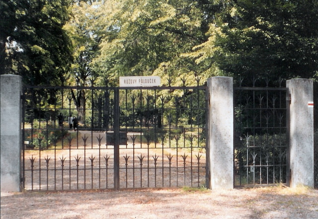 Vstup na Růžový palouček.